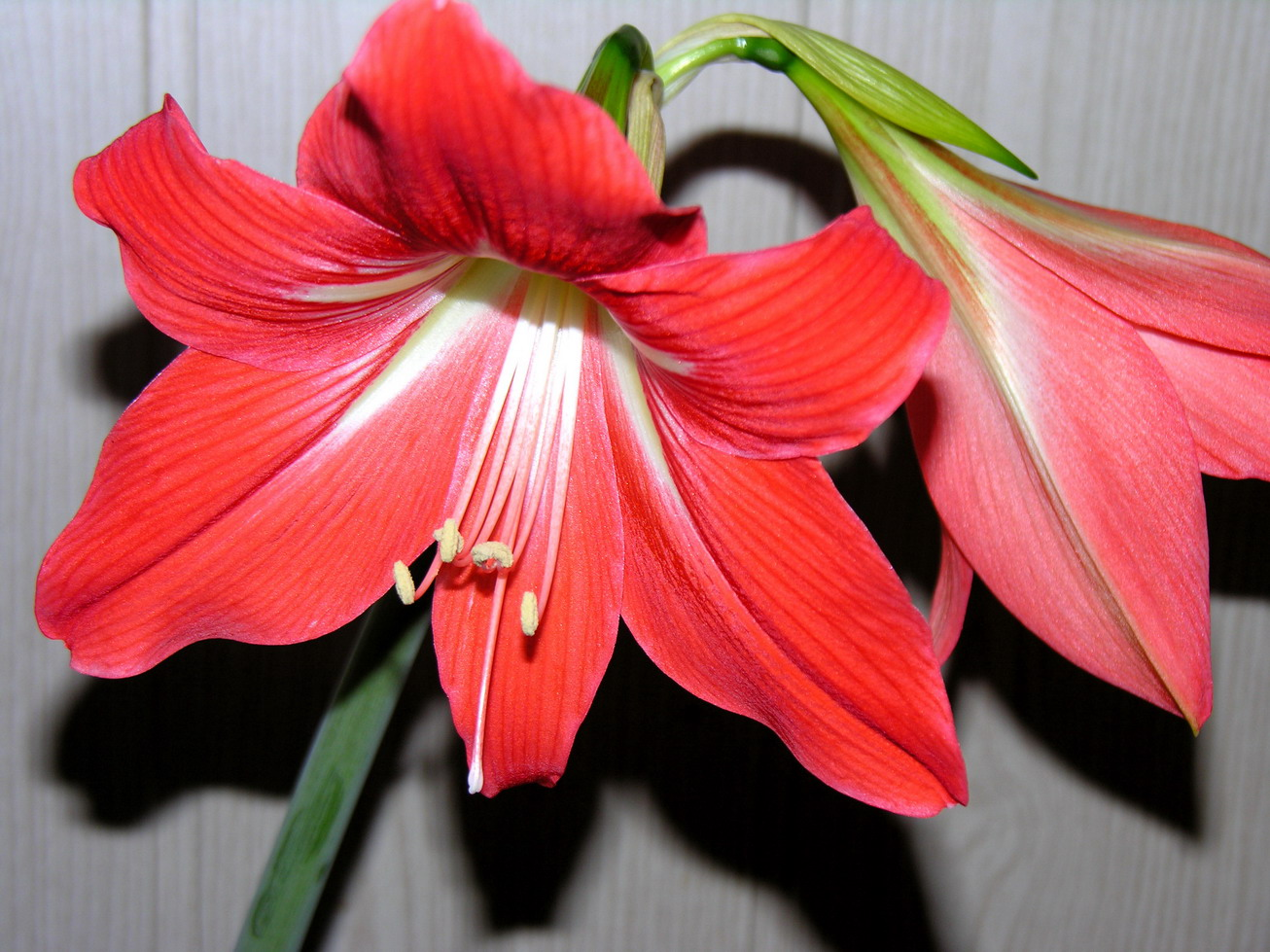 Meilenis (Hippeastrum) Šeima. Amariliniai (Amaryllidaceae) Foto: Algirdas, 2006 m. balandžio 1 d.